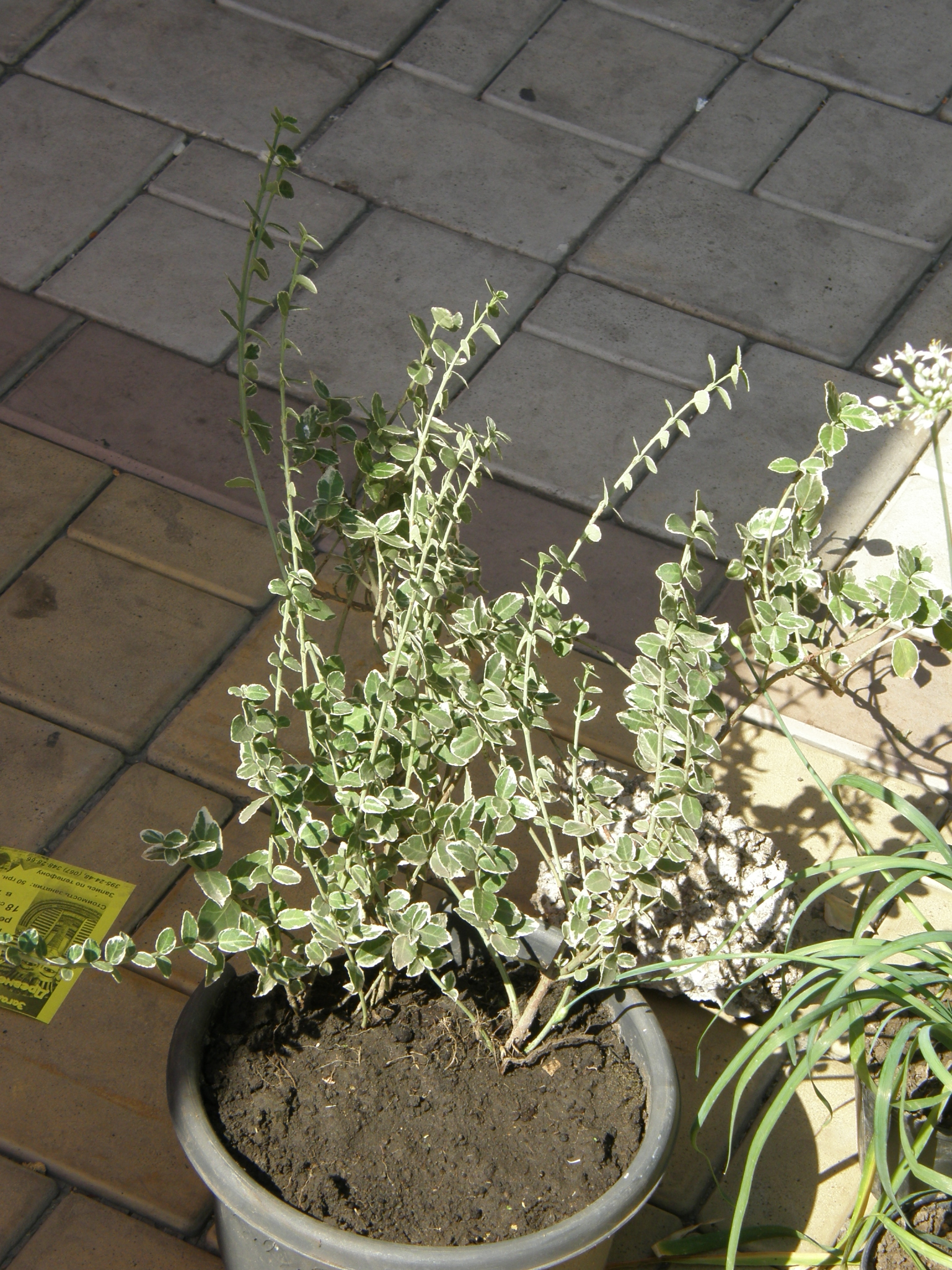 Донецк. Празднование дня города и дня шахтёра. Выставка цветов